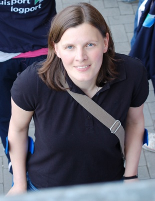 Pia Wunderlich